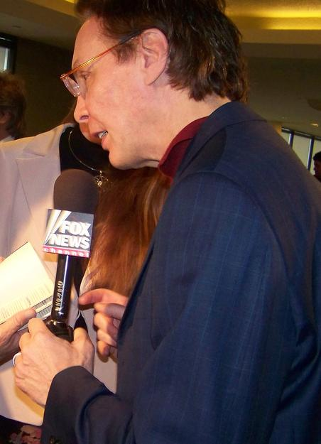 Alan Colmes interviews Dennis Kucinich in Manchester, NH